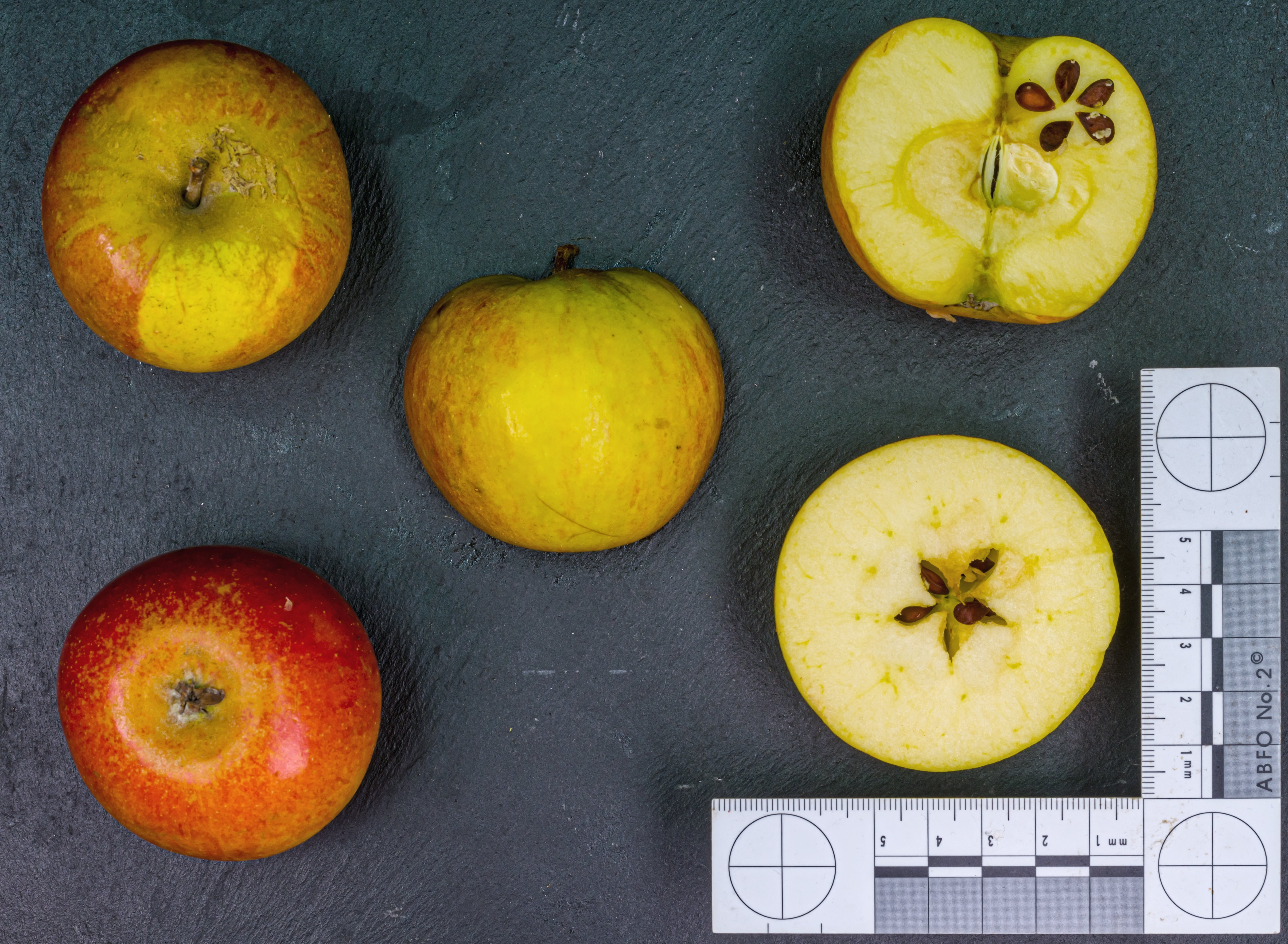 Apfelsorte Cox Orange